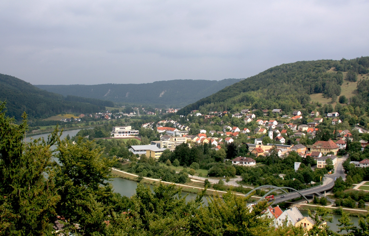 Das Altmühltal mit dem Main-Donau-Kanal bei Riedenburg.